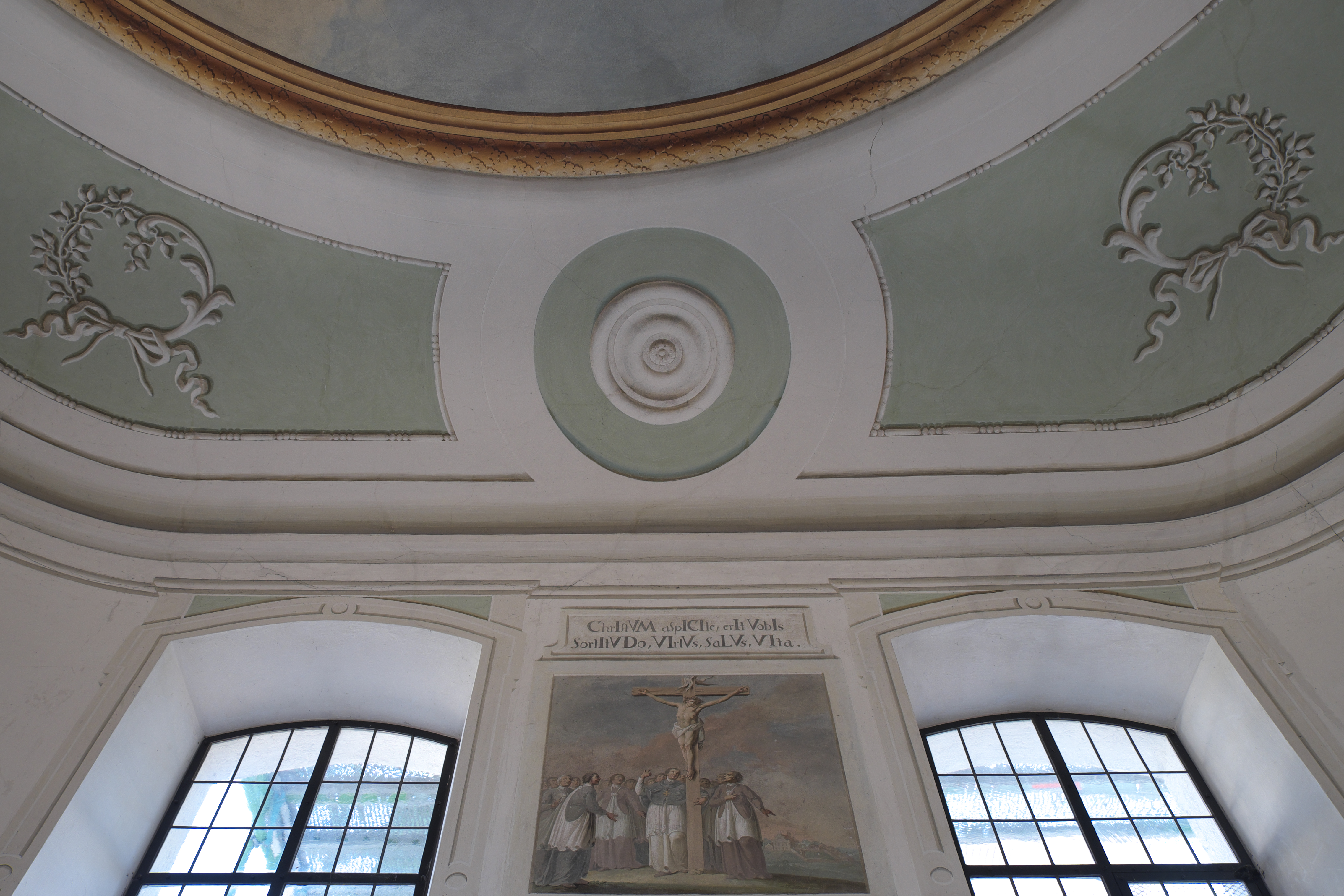 Katholische Kapelle St. Nikolaus von Tolentino in Schlipsheim (Neusäß) im Landkreis Augsburg (Bayern/Deutschland), Dekor der Decke